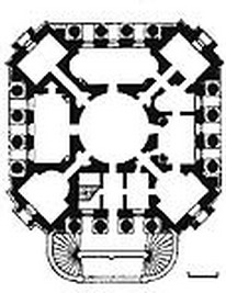 План палацу (Петровське-Алабіно). 1776–1780 рр.jpg: фіксаційний план пам'ятки архітектури 18 ст.